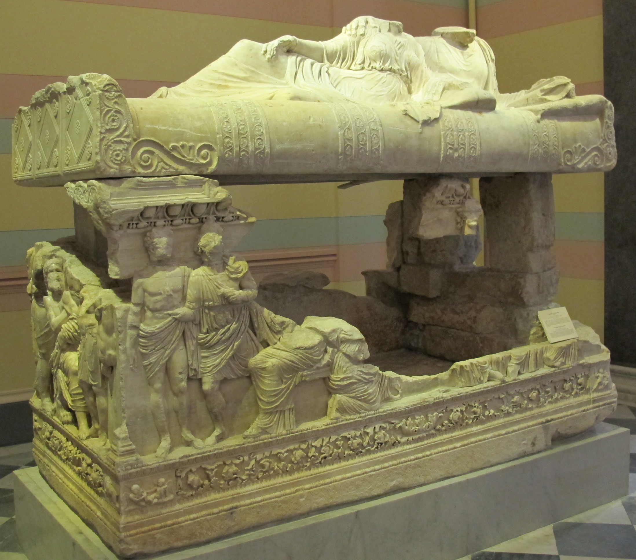 Sarcofago da myrmekion, attica, 150-200 dc.